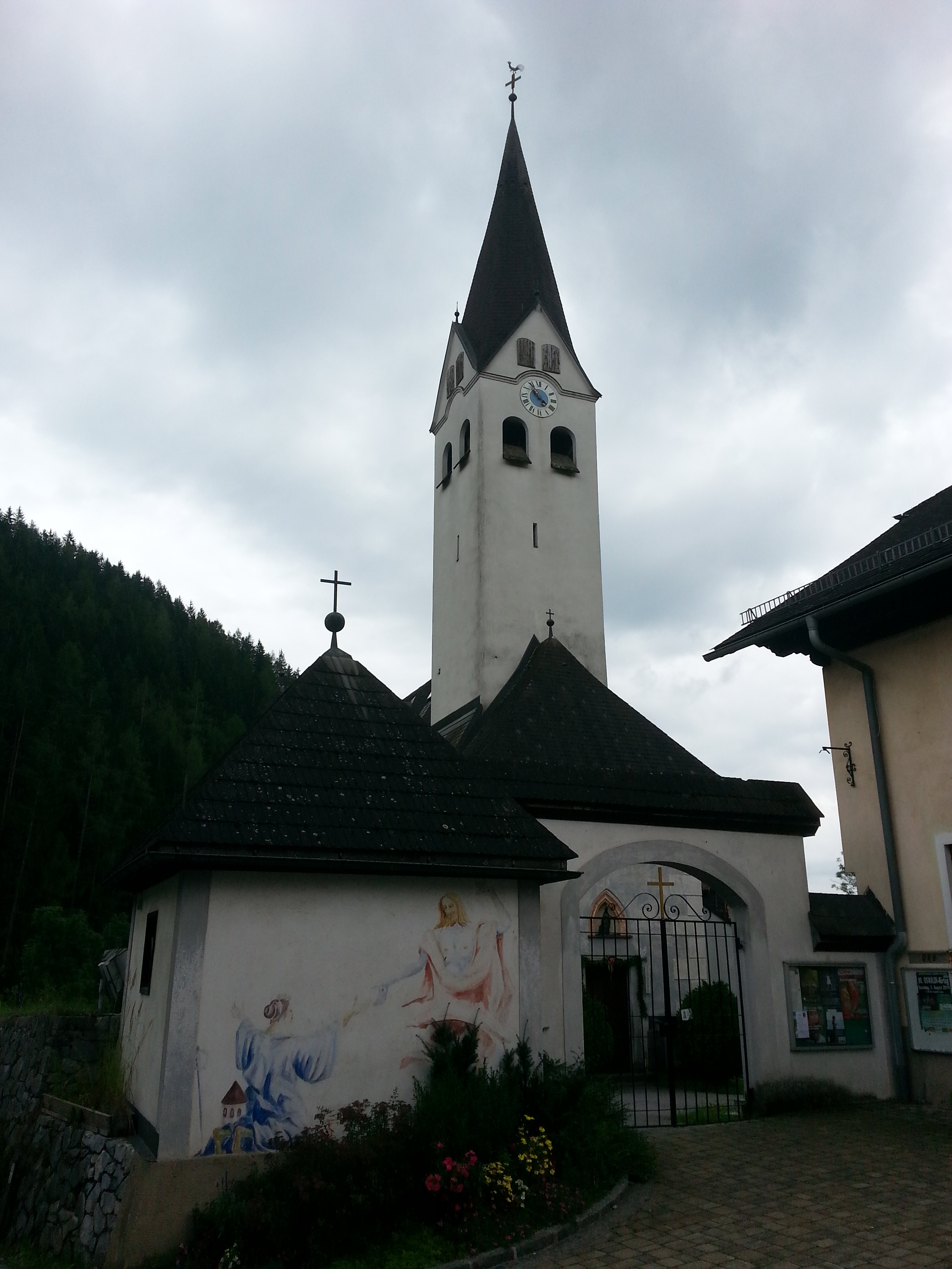 Kath. Pfarrkirche hl. Oswald mit Friedhof und Kriegergedächtniskapelle